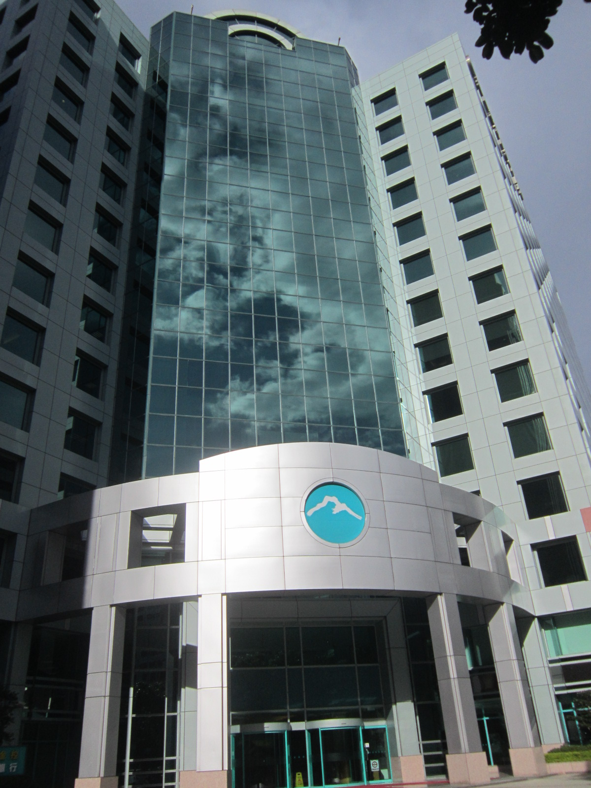 玉山金控總部大門